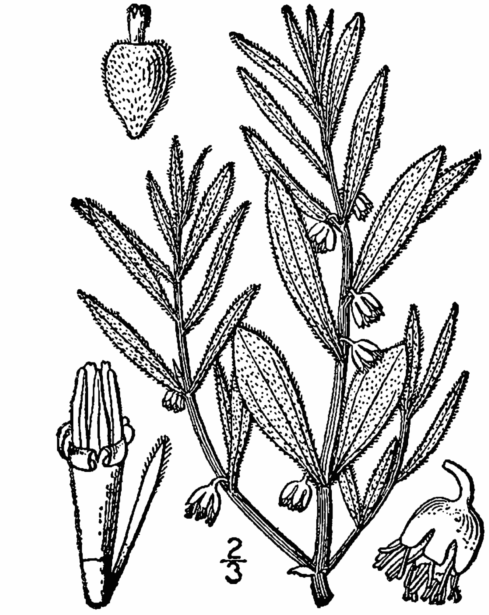 Iva axillaris